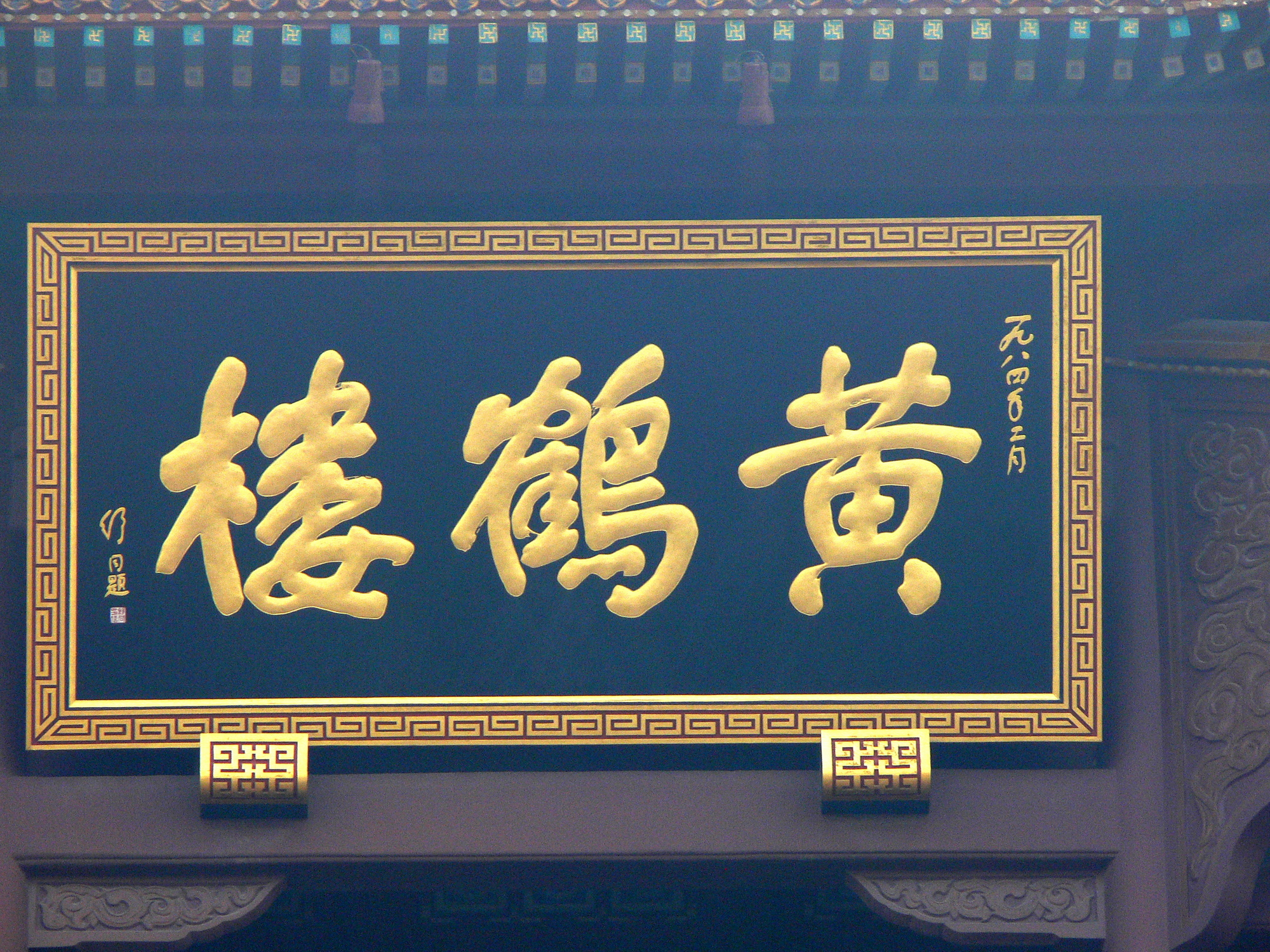 中文（中国大陆）: “黄鹤楼”匾额，1984年舒同撰写